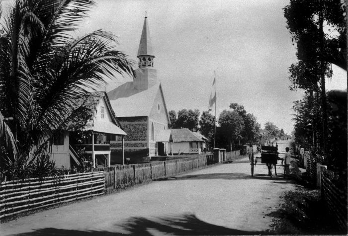 Foto. Kerk te Tomohon.